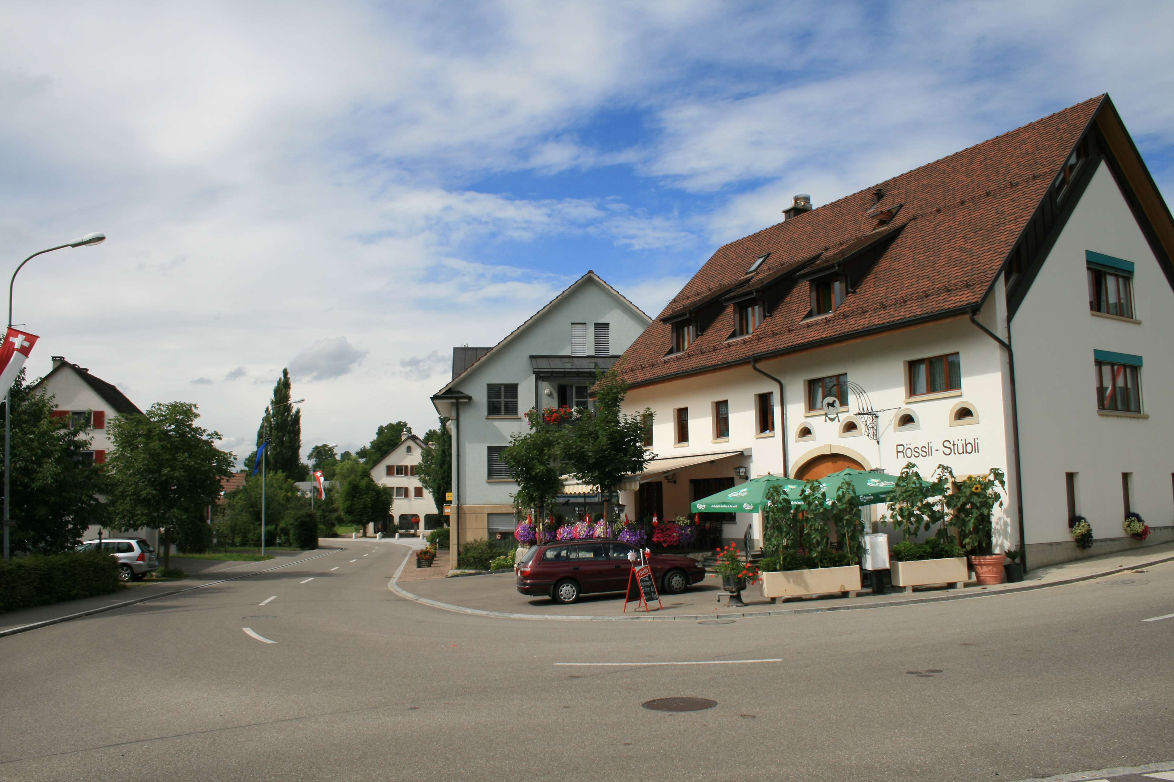 Zeihen AG, Schweiz